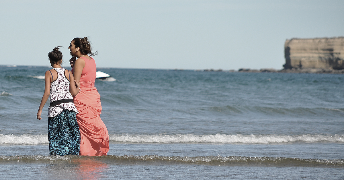 Grupo de mujeres gitanas en una playa cercana a Caleta Olivia, Santa Cruz, Argentina.